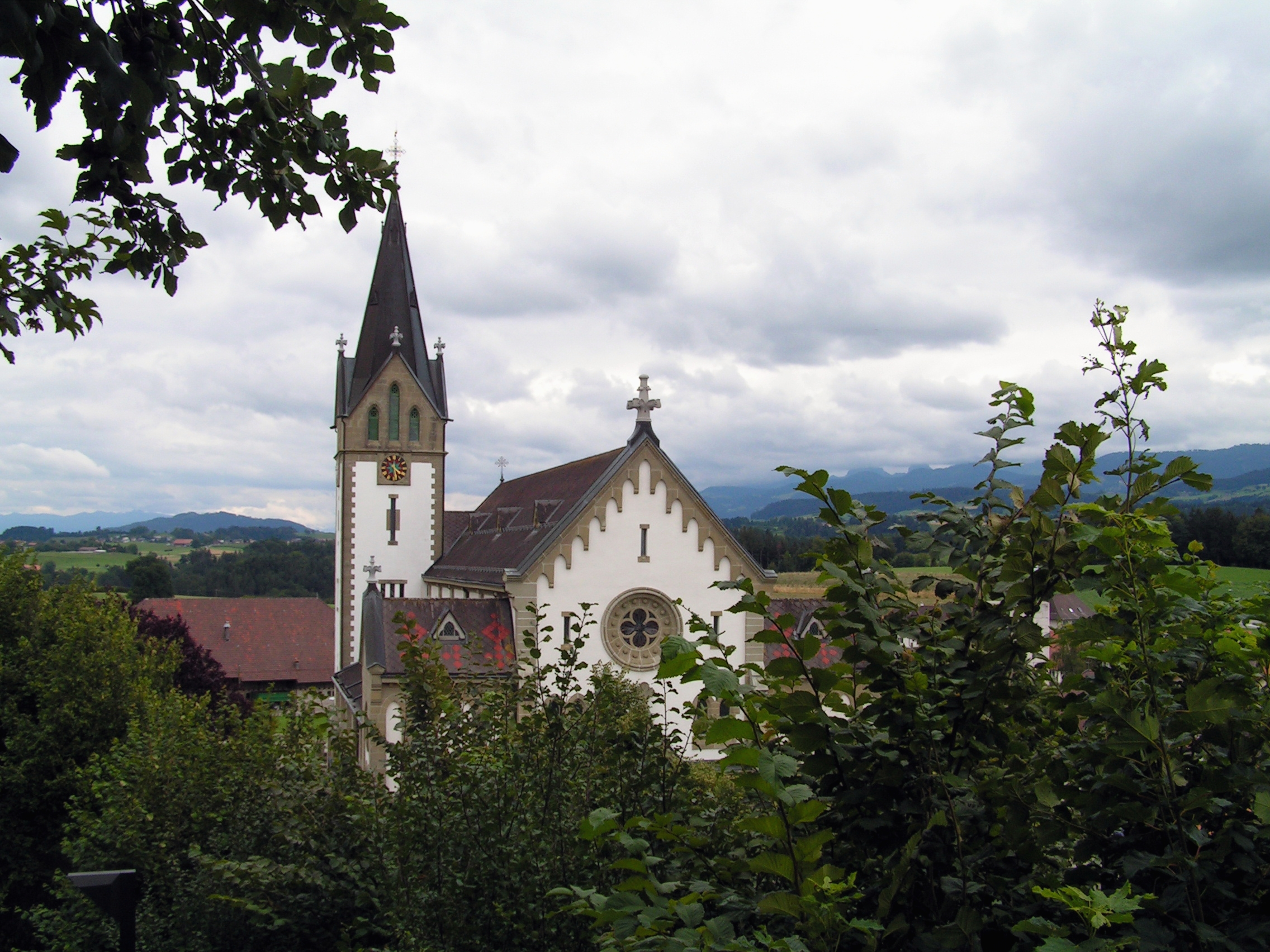 Heitenried. Église Saint-Michel.